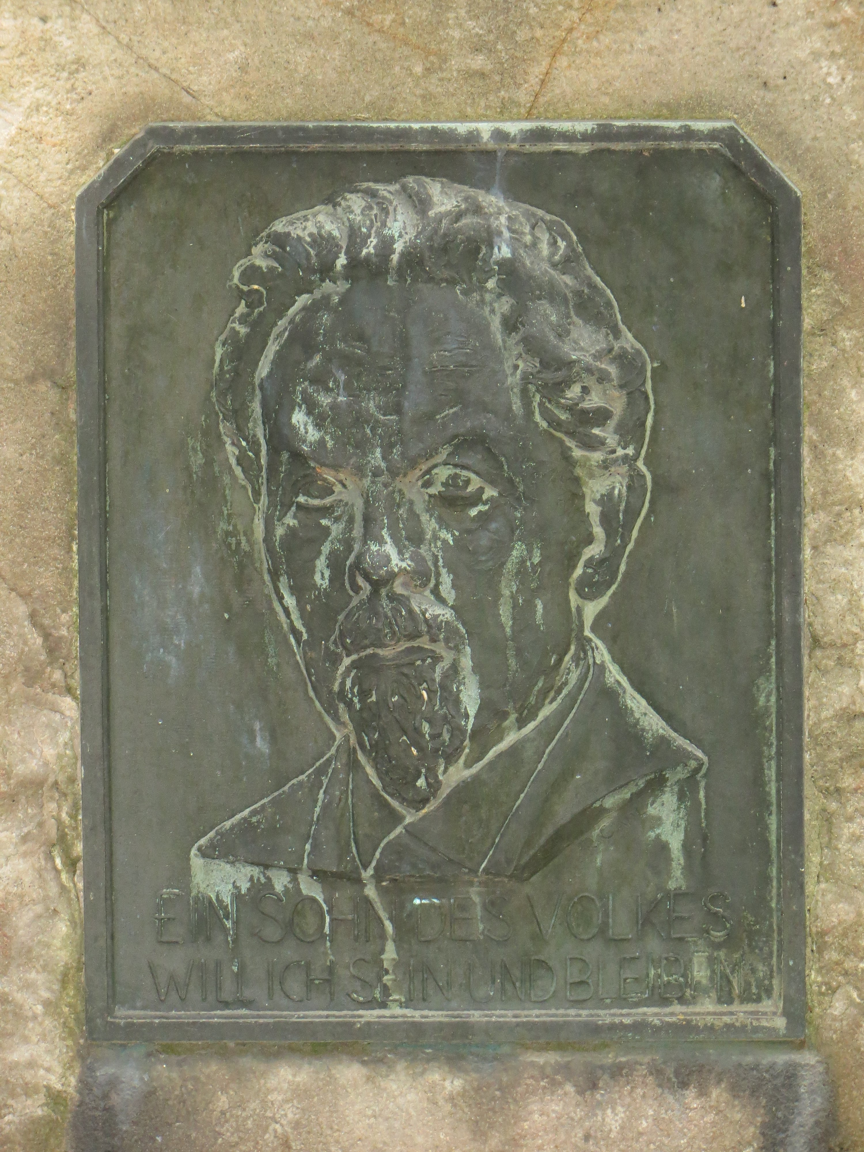 Metallrelief auf dem Grabstein Gustav Kittlers (1849–1929) auf dem Heilbronner Hauptfriedhof